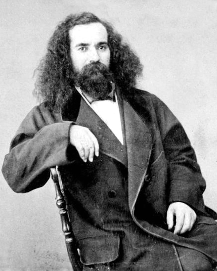 Orélie Antoine de Tounens (*La Chaise, Francia; 12 de mayo de 1825 - † Tourtoirac, Francia - 19 de septiembre de 1878), en español usualmente citado como Orelio Antonio, fue un aventurero francés de origen noble que pasó a la historia por proclamarse Rey y fundar el Reino de la Araucanía y la Patagonia, al sur de América del Sur. En todos los documentos oficiales en los cuales aparece citado, acostumbraba emplear la siguiente fórmula denominativa: "Orélie-Antonie 1er., par la grâce de Dieu et la volonté des Indiens de l'Extrême Sud du Continent Americain, Roi d'Araucanie et de Patagonie" (Orélie-Antoine I, por la gracia de Dios y la voluntad de los indios del extremo sur del continente americano, Rey de la Araucanía y la Patagonia).